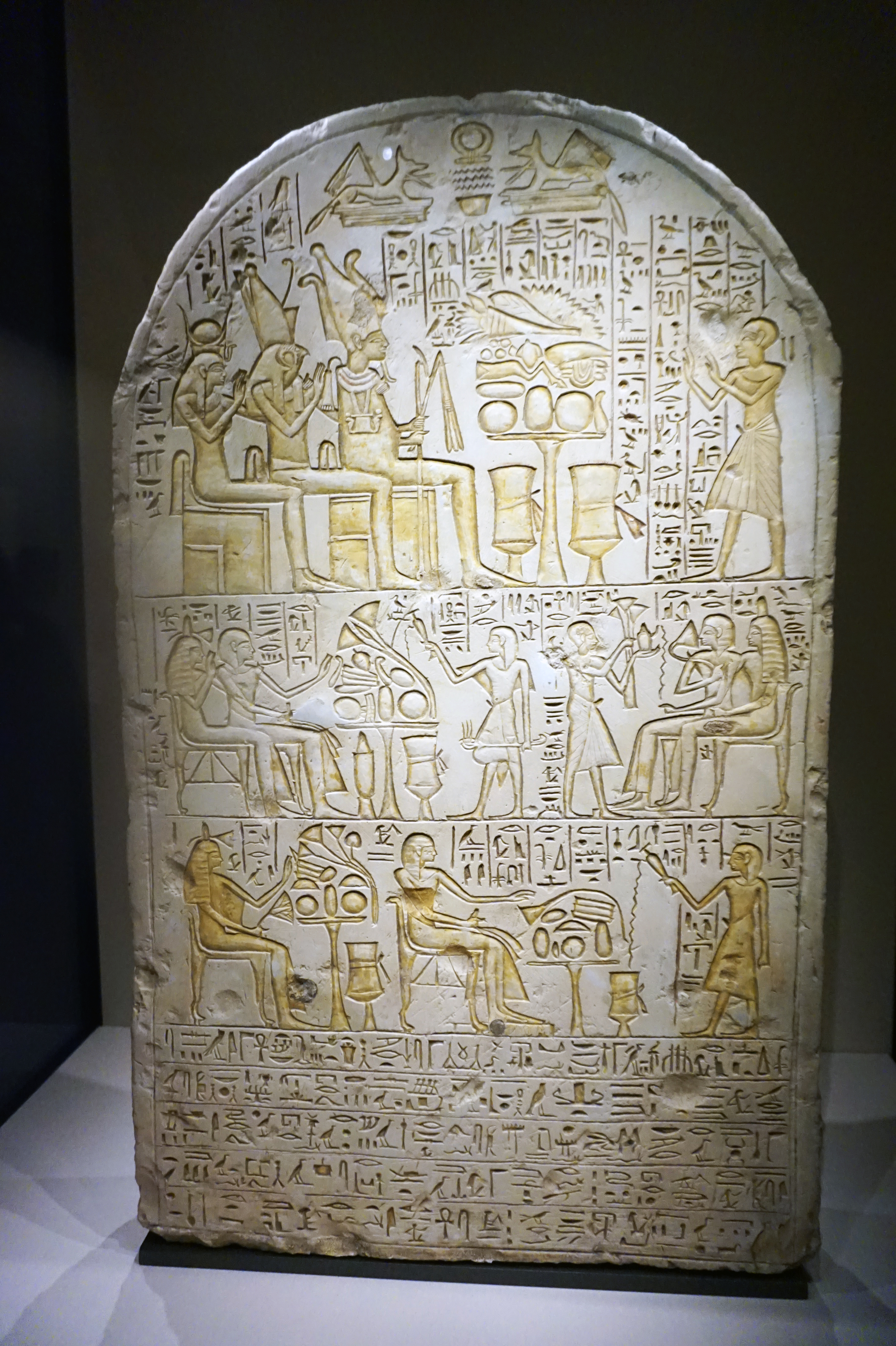 乌尔玛乌石碑。 约公元前1550-前1295年（埃及新王国时期，第18王朝）。彩绘石灰岩。来源地疑为阿拜多斯；杜兰收藏；1825年卢浮宫购入。 法国卢浮宫博物馆埃及文物部藏。（C 102；N 253）